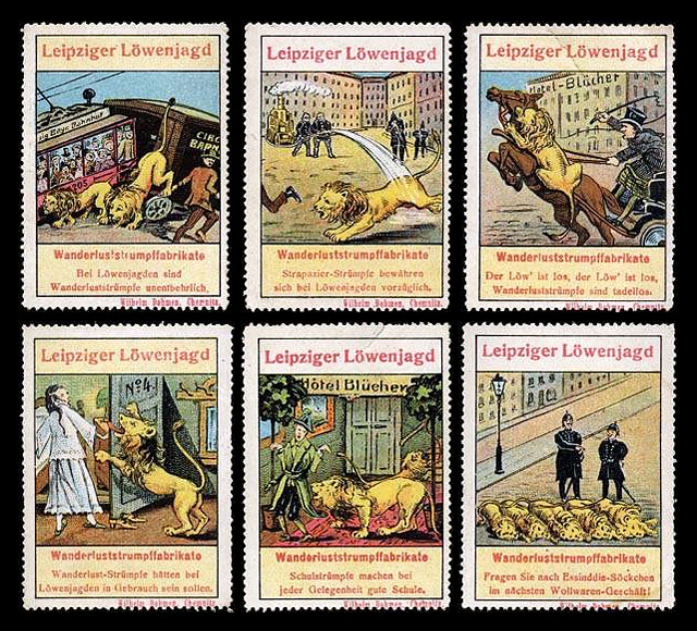 6 Reklamemarken, 6 × 5 cm, für Wanderluststrumpffabrikate, Wilhelm Dohmen, Chemnitz, anlässlich der Leipziger Löwenjagd am 19. Oktober 1913. Bei Löwenjagden sind Wanderluststrümpfe unentbehrlich. Strapazier-Strümpfe bewähren sich bei Löwenjagden vorzüglich. Der Löw' ist los, Wanderluststrümpfe sind tadellos. Wanderlust-Strümpfe hätten bei Löwenjagden in Gebrauch sein sollen. Schulstrümpfe machen bei jeder Gelegenheit gute Schule. Fragen Sie nach Essinddie-Söckchen im nächsten Wollwaren-Geschäft!